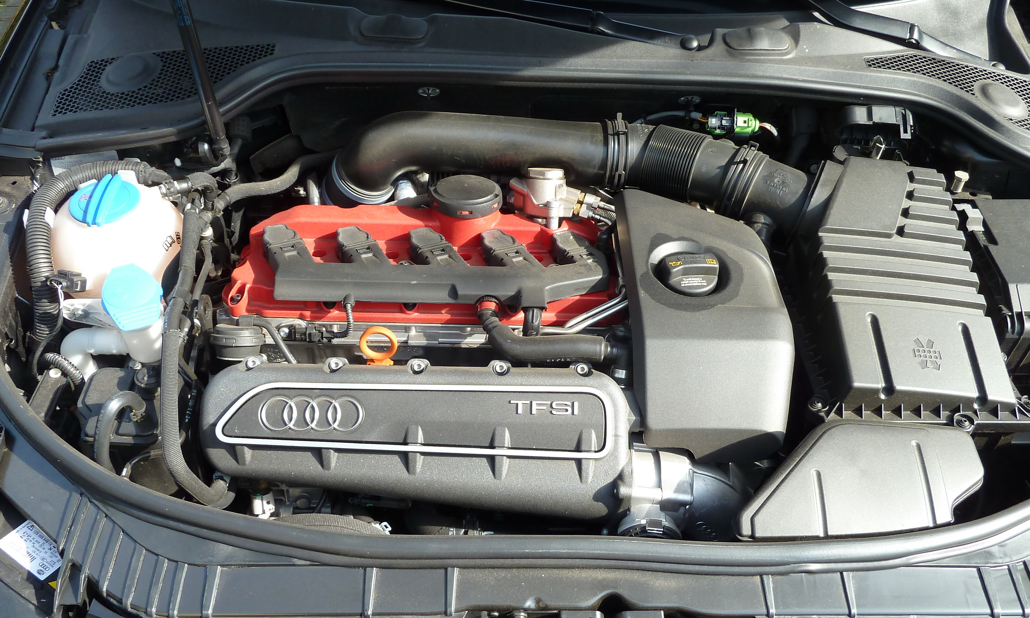 Motor eines Audi RS3 8PA